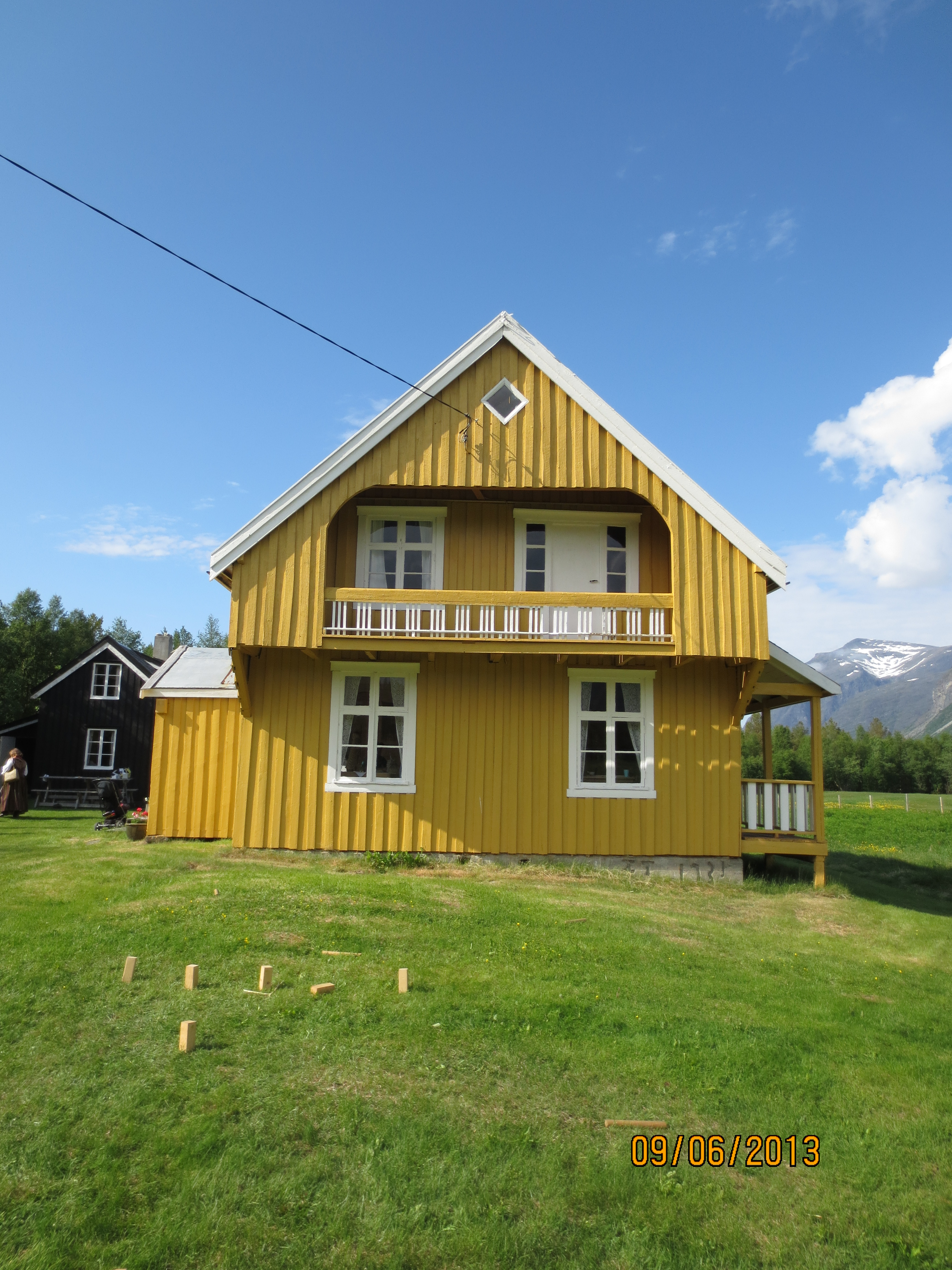 Tørfoss kvengård fra 1931, tilhører Nord-Troms museum